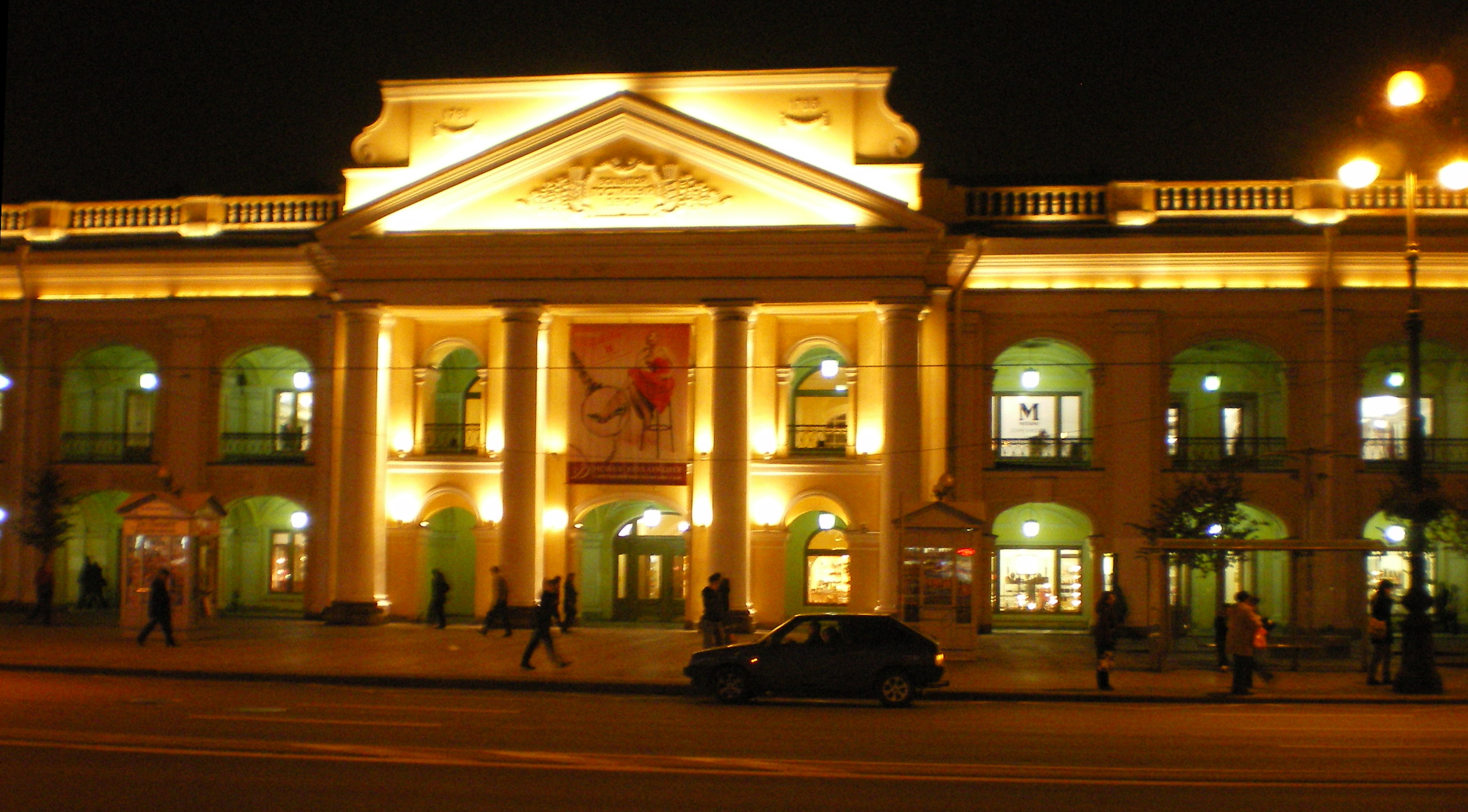 Фронтон, 2007 год. Ночь.